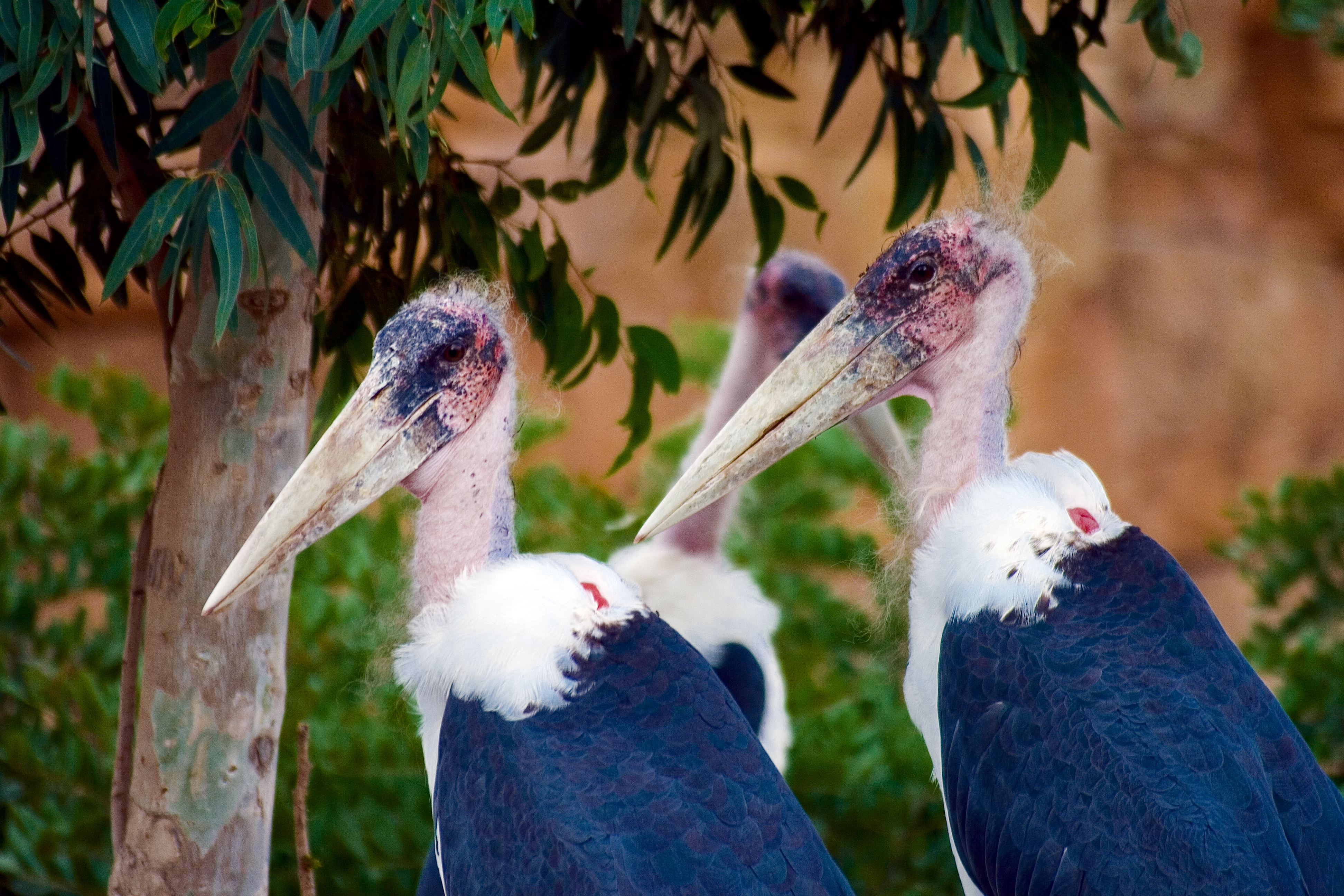 Marabú Africano II - Bioparc Valencia